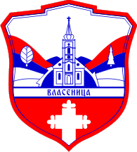 Wappen von Vlasenica Bosnien und Herzegowina